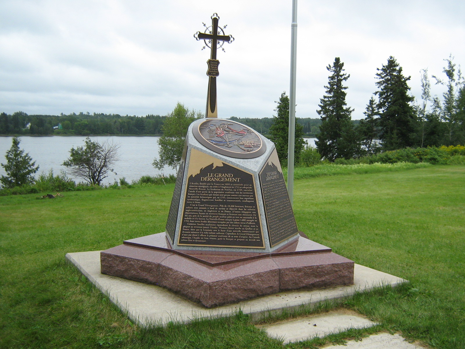 Monument du Grand Dérangement dans le parc provincial The Enclosure au Nouveau-Brunswick